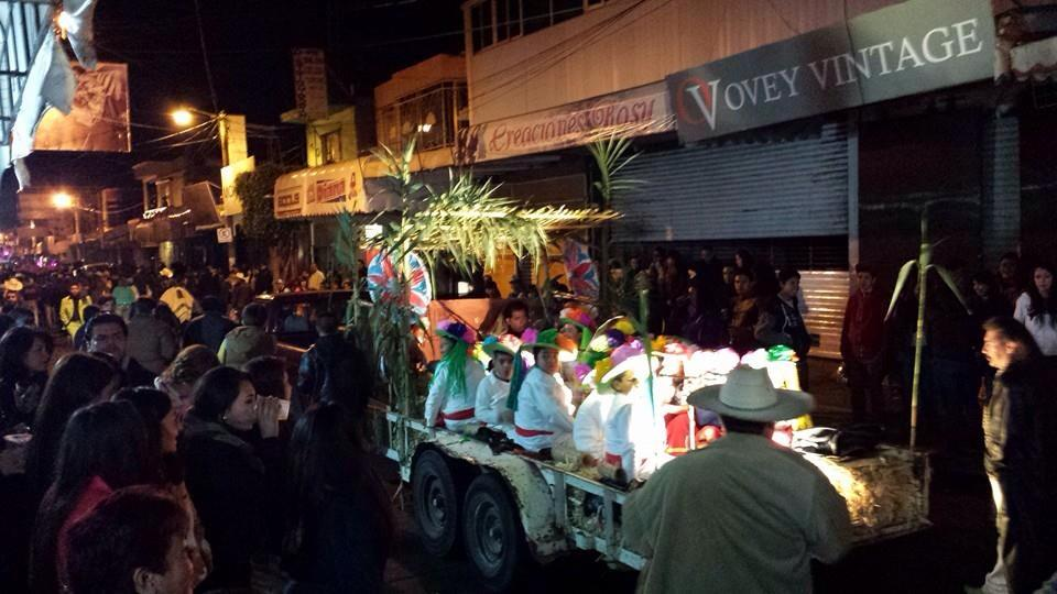 Desfile del Paseo de carros 25 de Diciembre de 2013 en Uriangato, Gto.